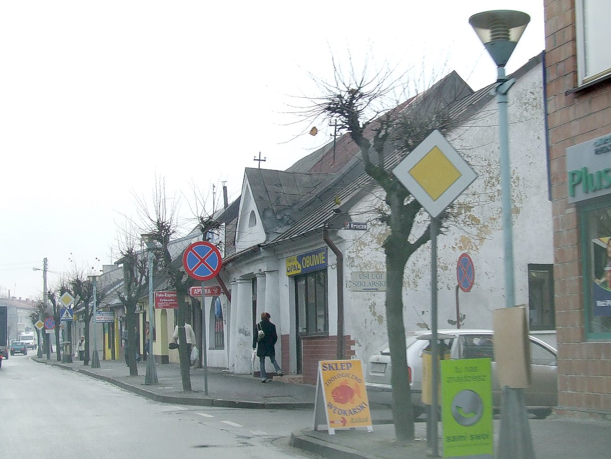 Pajęczno, woj. łódzkie, południowa pierzeja rynku.